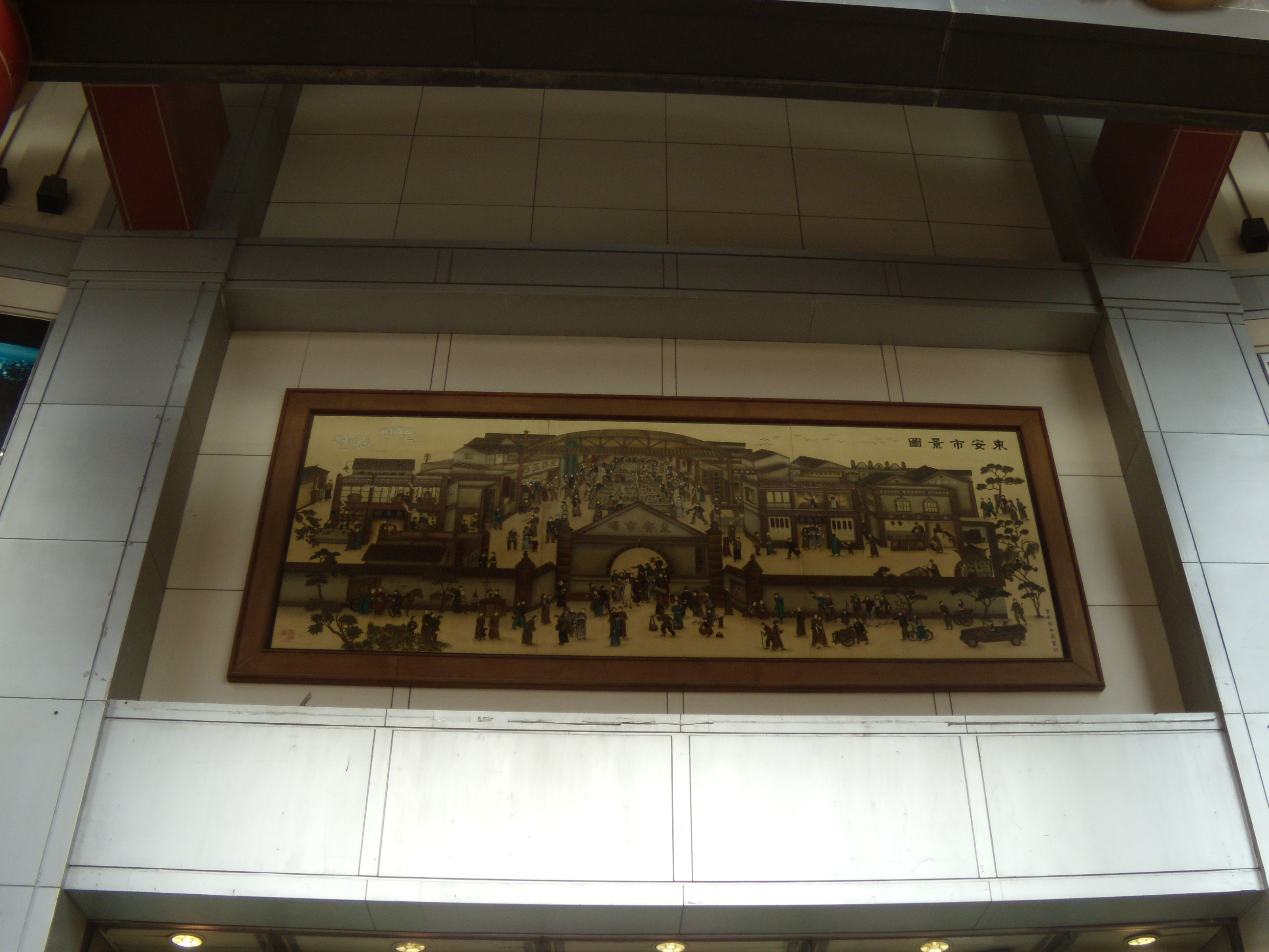 东安市场大门上方的老东安市场图，位于王府井大街